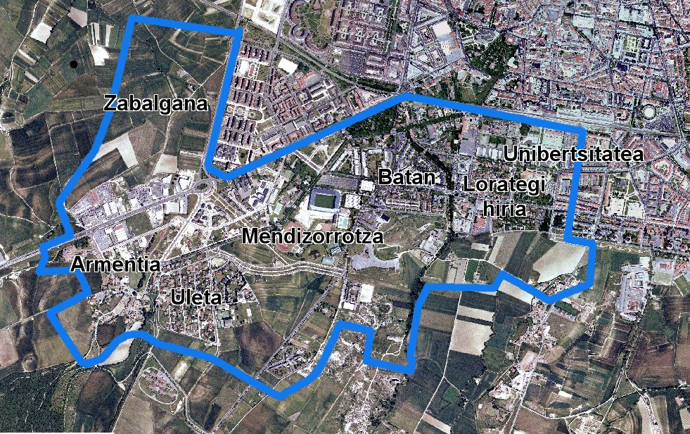 Mendizorrotza (Gasteiz) auzoaren ortoargazkia / Ortofoto del barrio de Mendizorrotza (Vitoria)